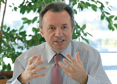 Photo officielle de Jean Noël Guérini